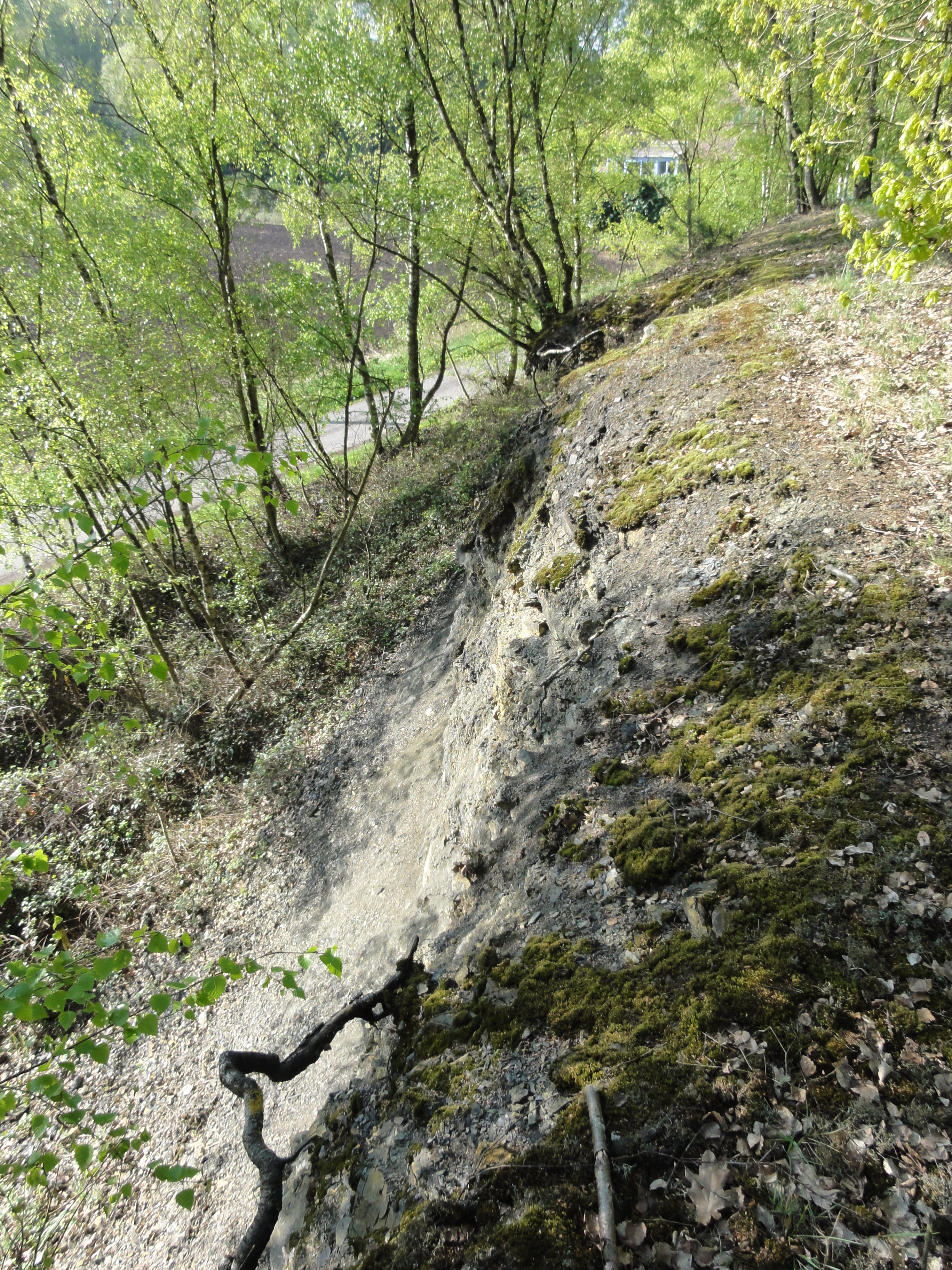 Terril n° 124B dit 1 de Flines Ouest, Fosse n° 1 Saint Charles de la Compagnie des mines de Flines puis de la Compagnie des mines d'Aniche, Flines-lez-Raches, Nord, Nord-Pas-de-Calais, France.